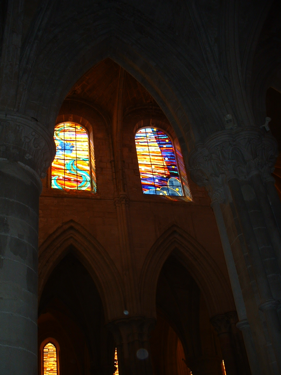 Vidrieras de la Catedral de Cuenca.